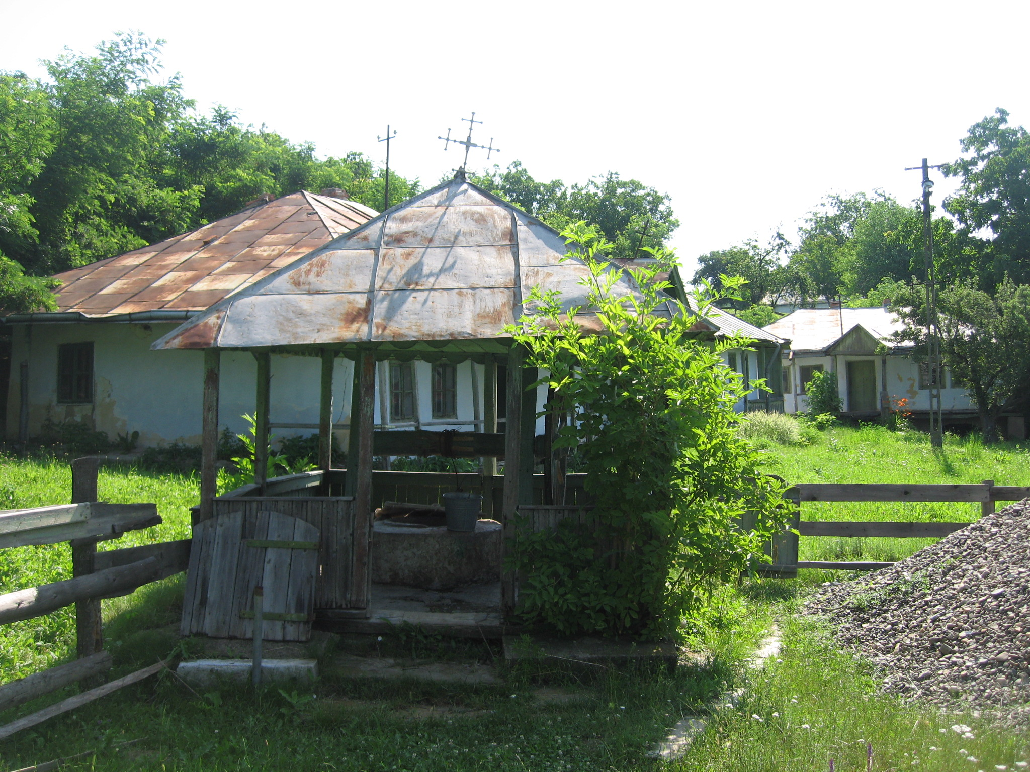 Mănăstirea Agafton 04